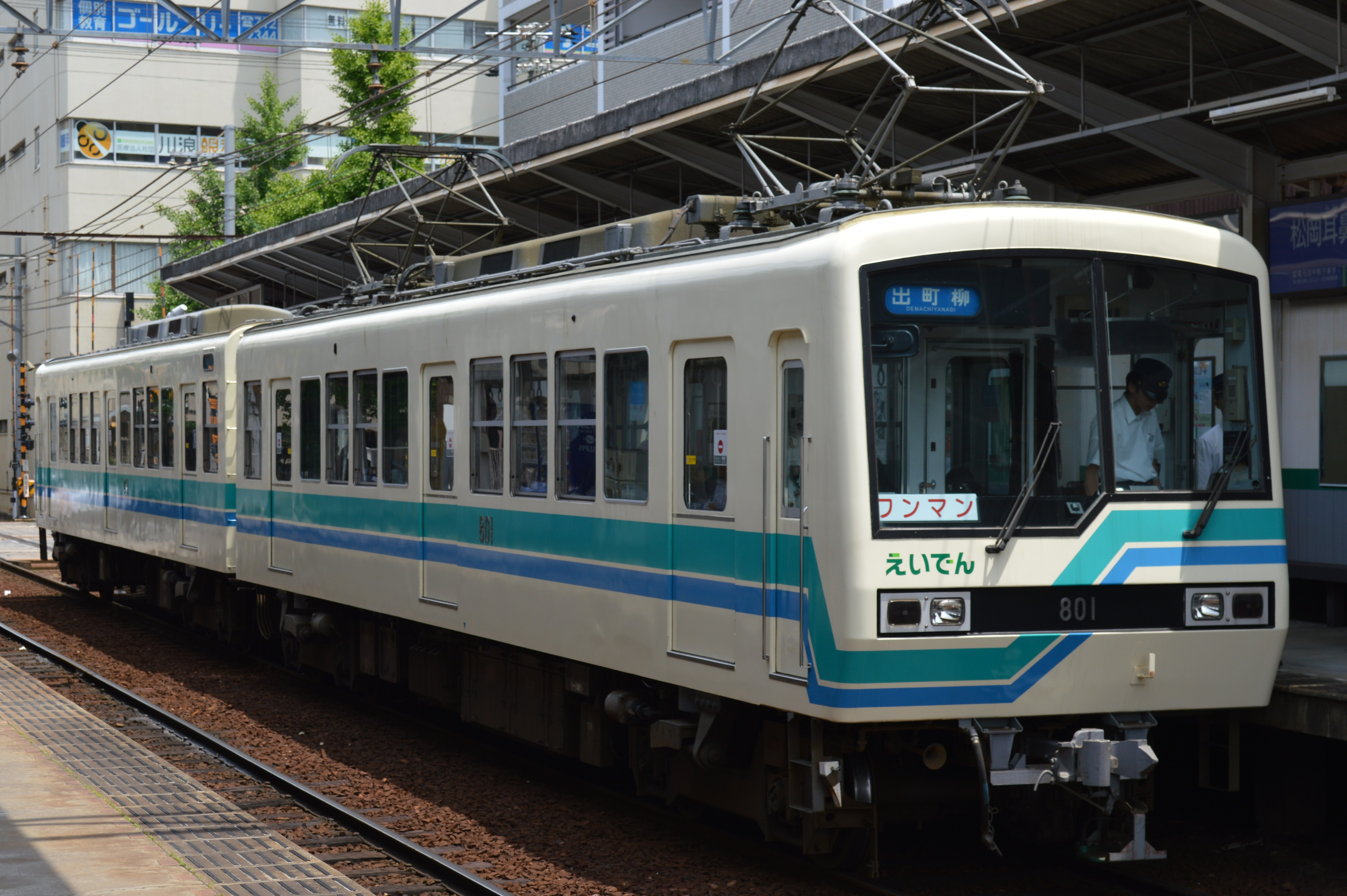 叡山電鉄デオ800系（801-851） 修学院駅停車中